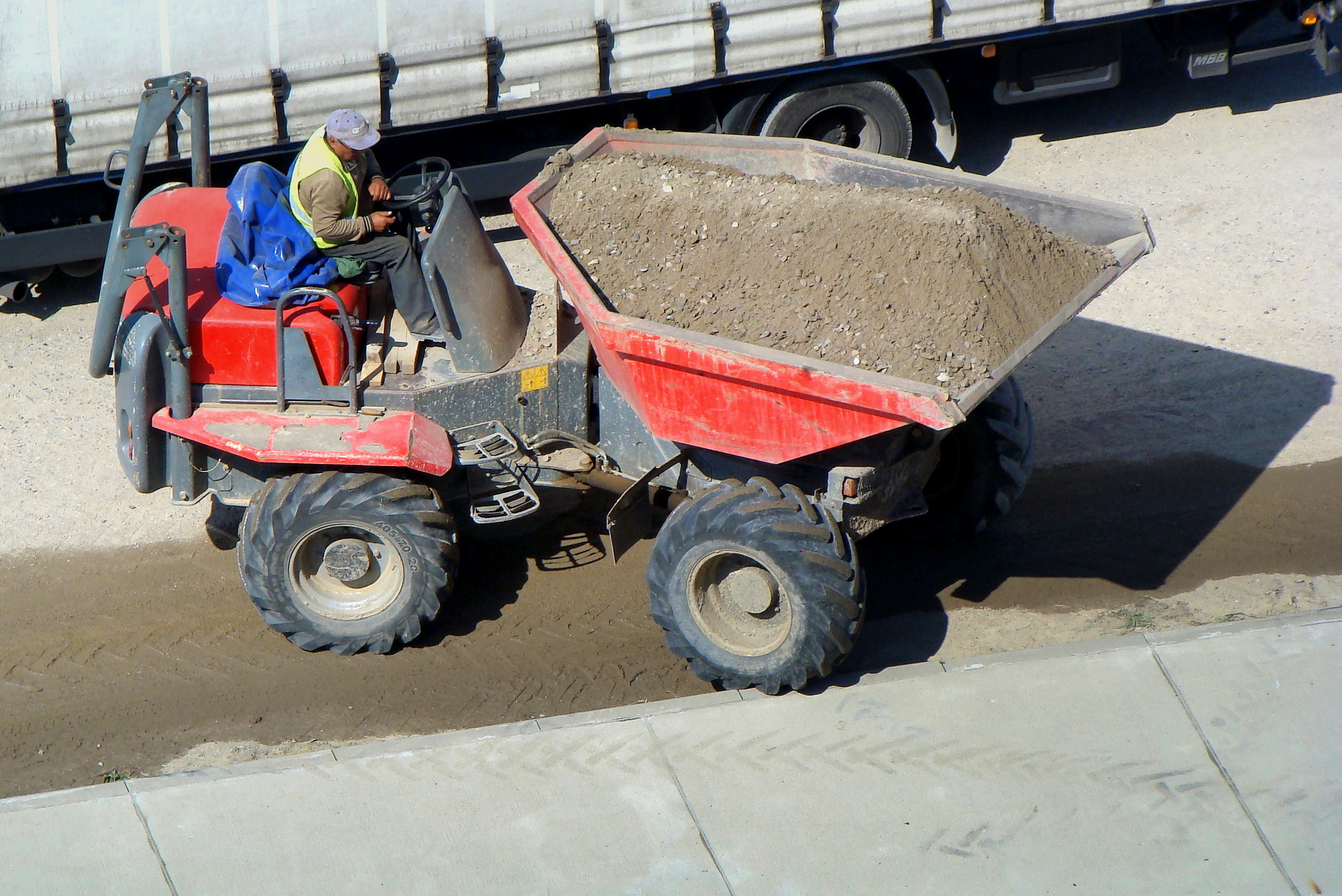 Wozidło przegubowe " Wacker Neuson " podczas pracy.